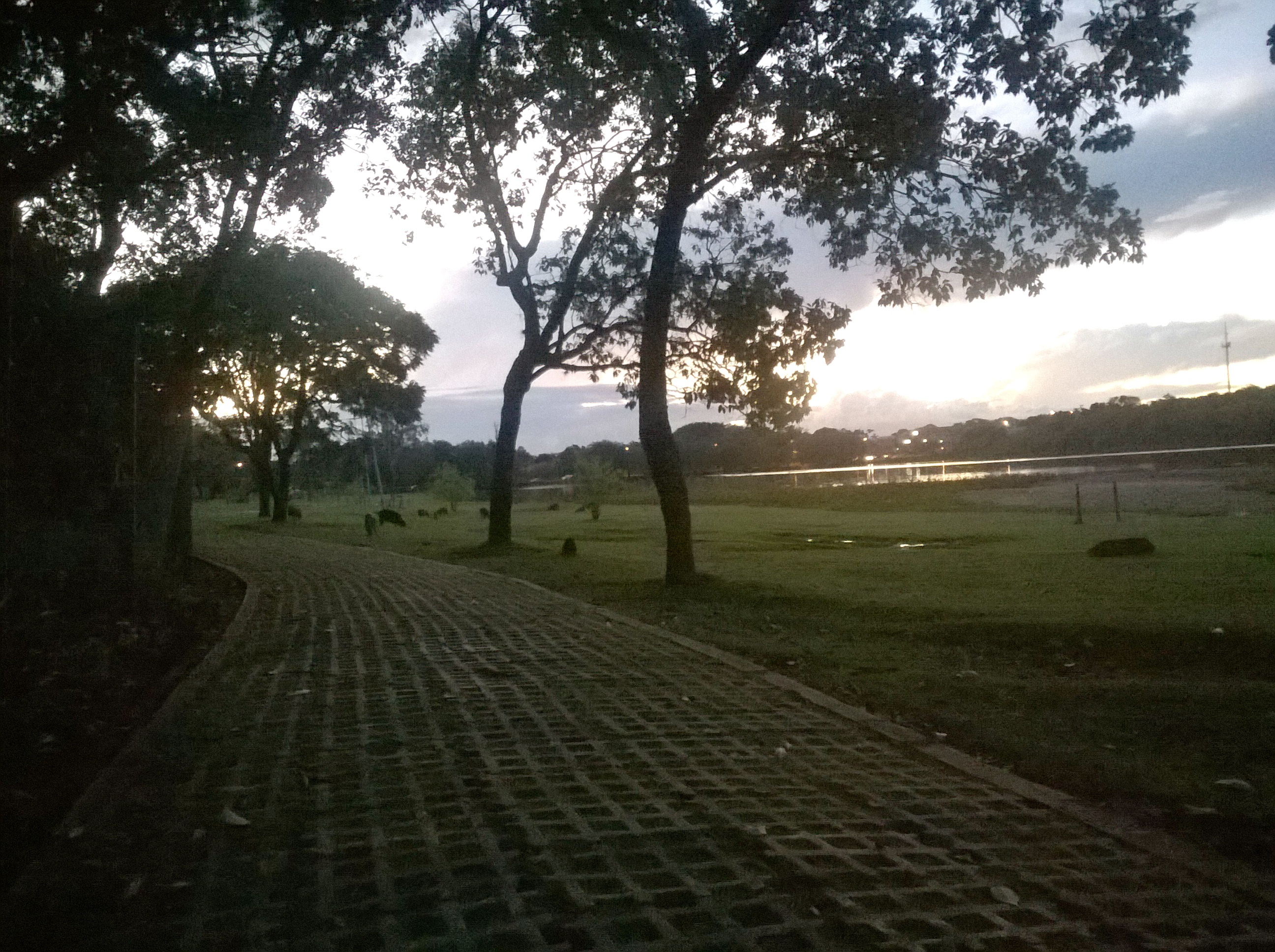 Campo na Universidade Federal de Mato Grosso do Sul, em junho de 2015.